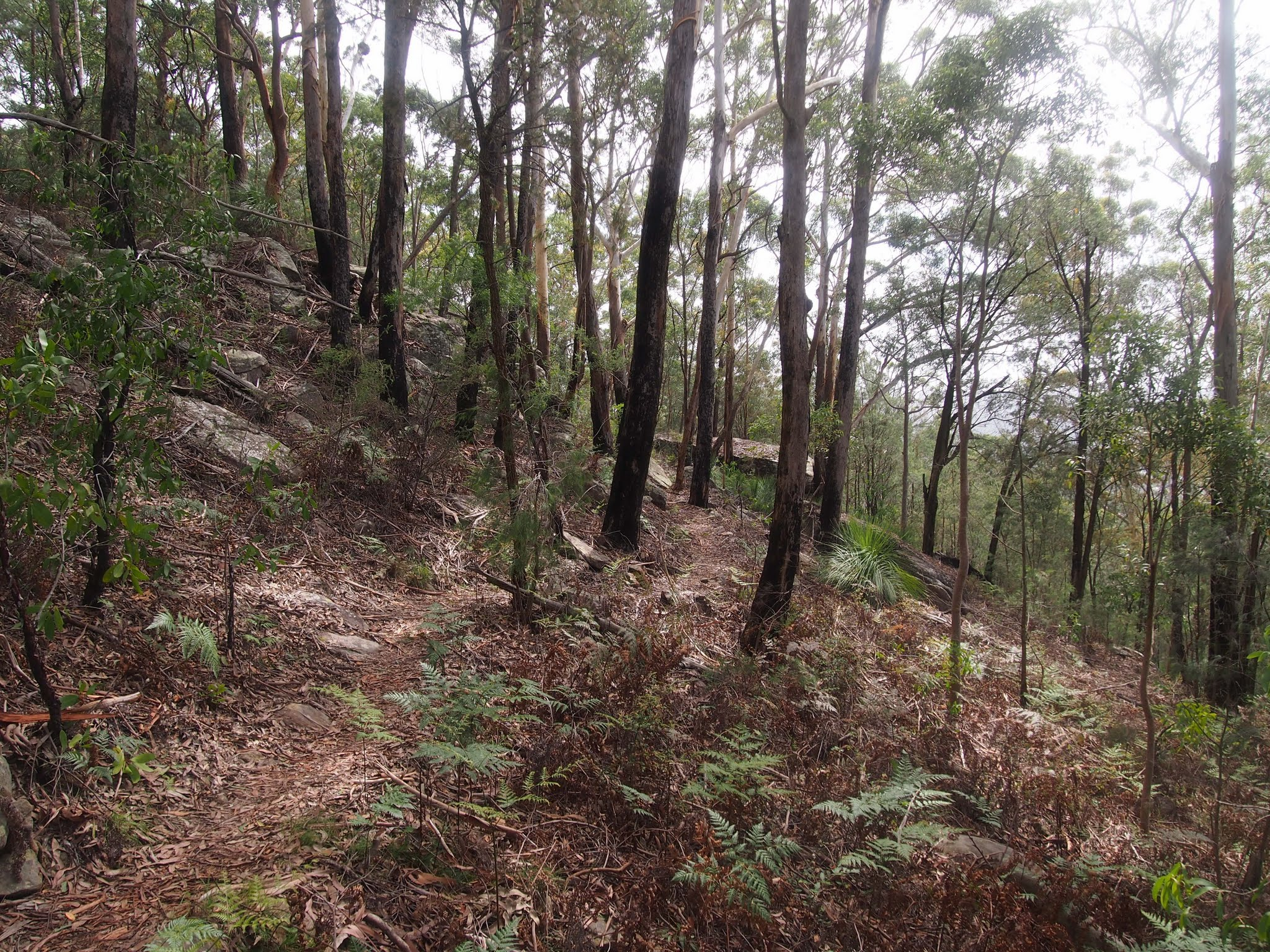 Rumbalara Reserve